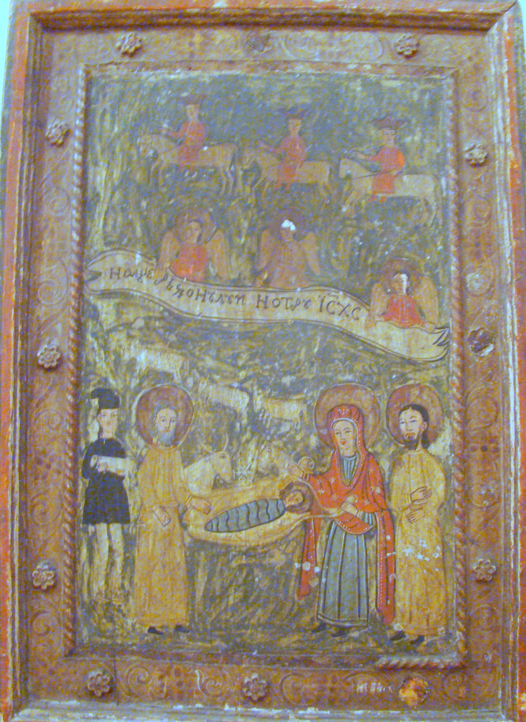 Muzeul grăniceresc năsăudean